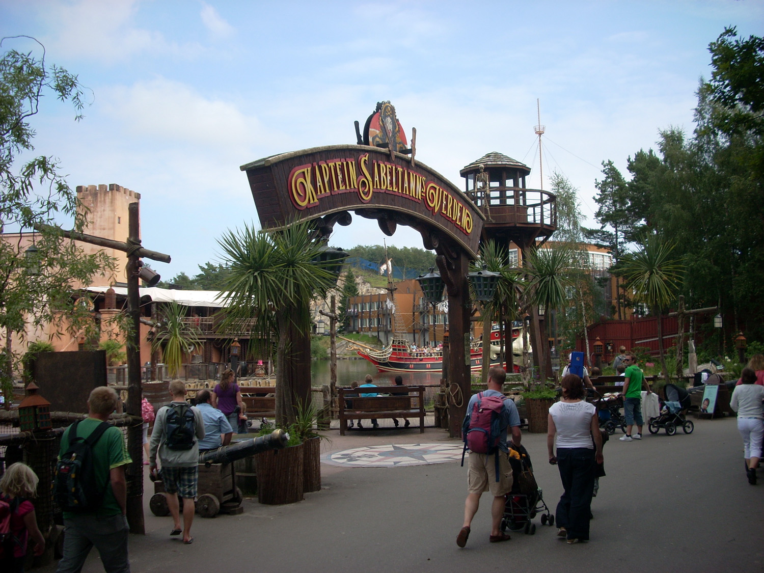 Kaptein Sabeltanns verden, Kristiansand, Norge